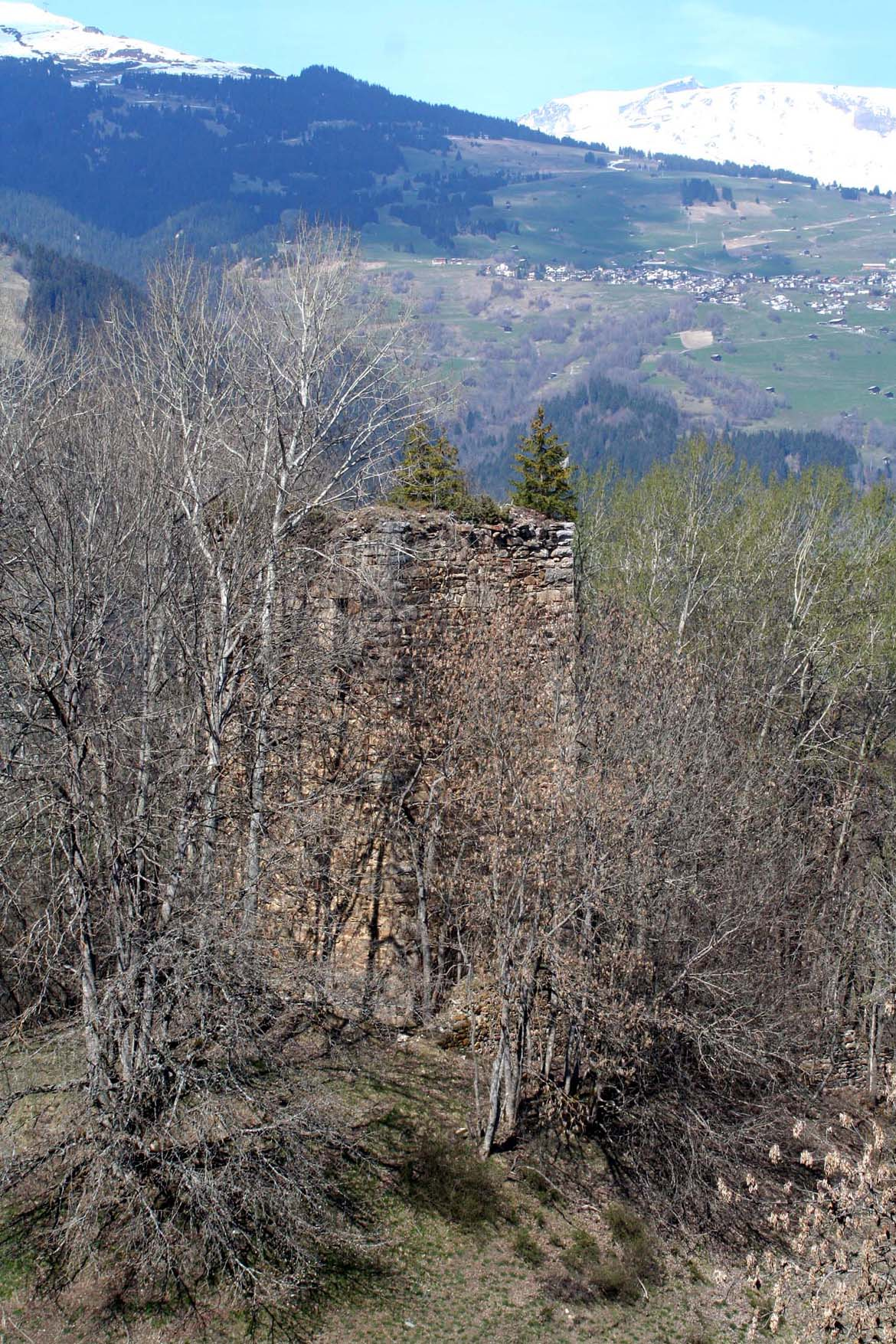 Castelberg Lage